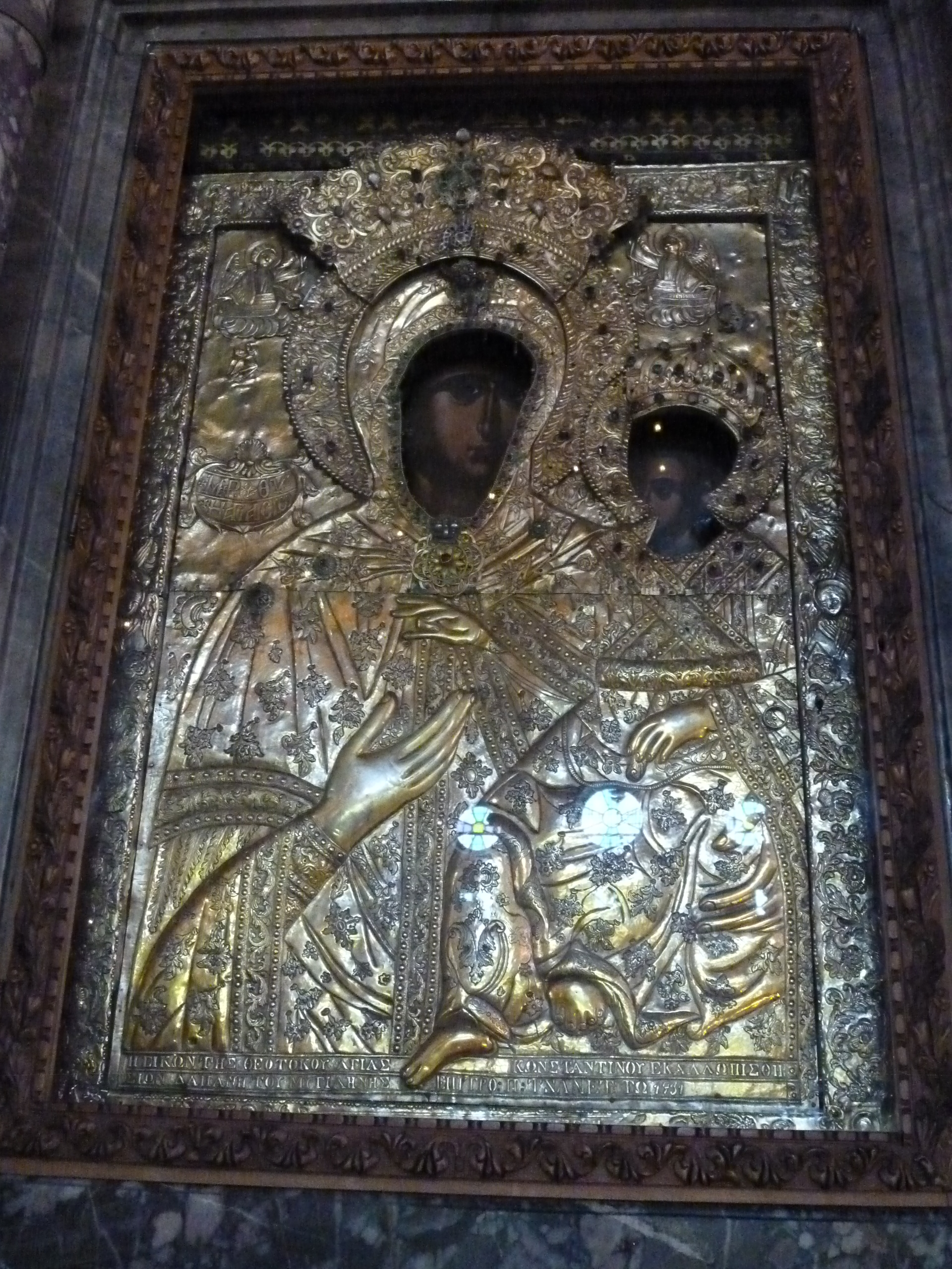 Marien-Ikone in der Wallfahrtskirche Agia Panagia in Agiassos, Lesbos, Griechenland.